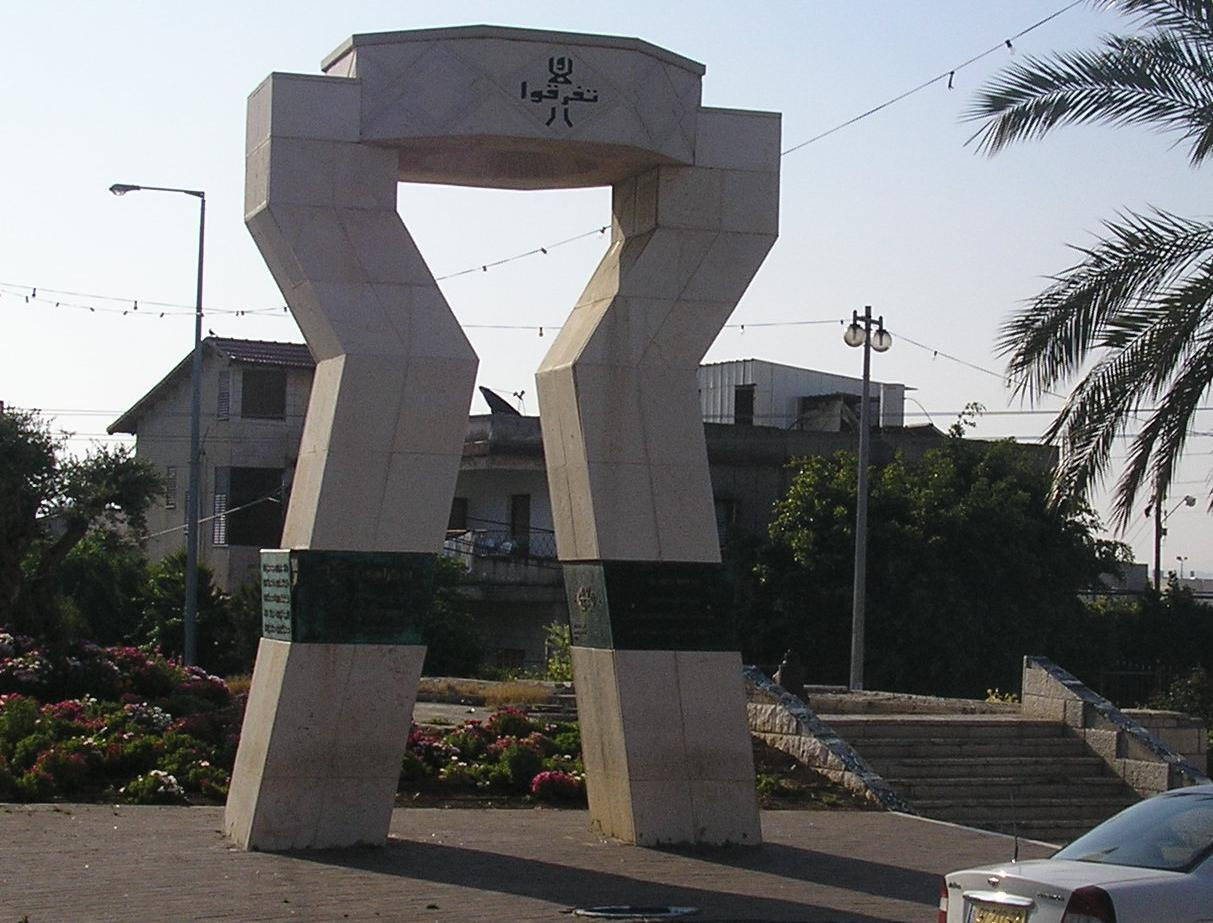 Kafr-Manda, Israel כיכר בכפר מנדא, ישראל